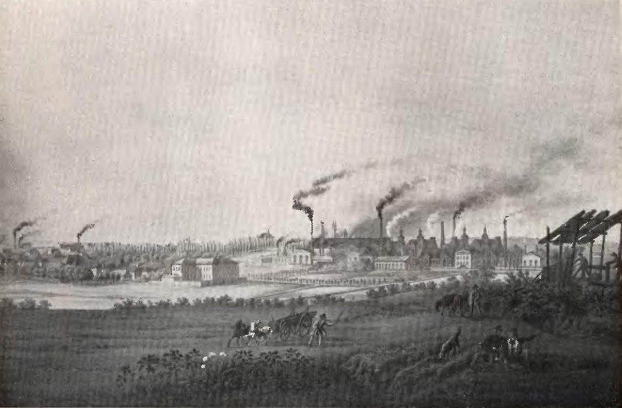 Königshütte in Oberschlesien um 1865